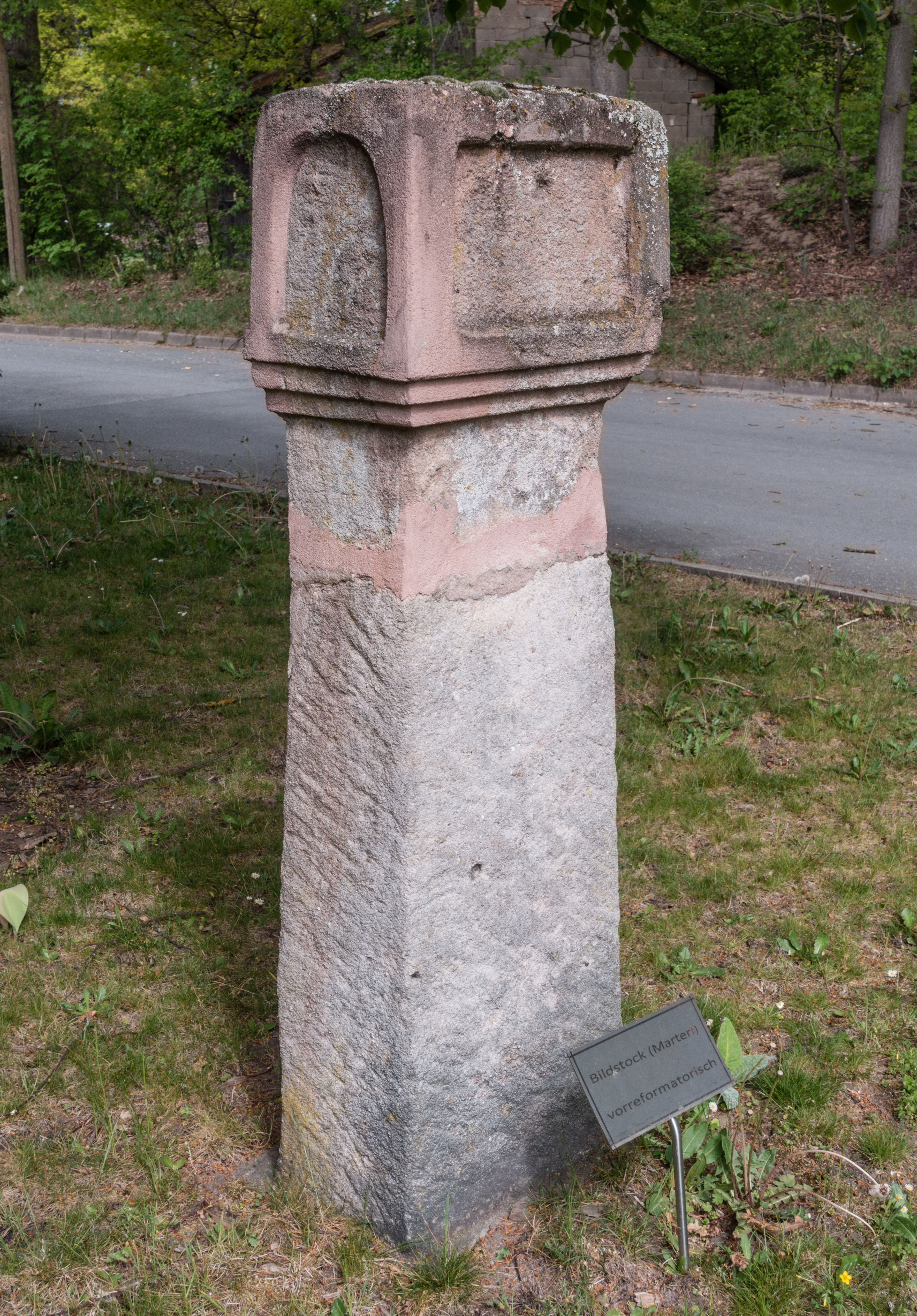 Bildstock, Großschwarzenlohe, Baudenkmal